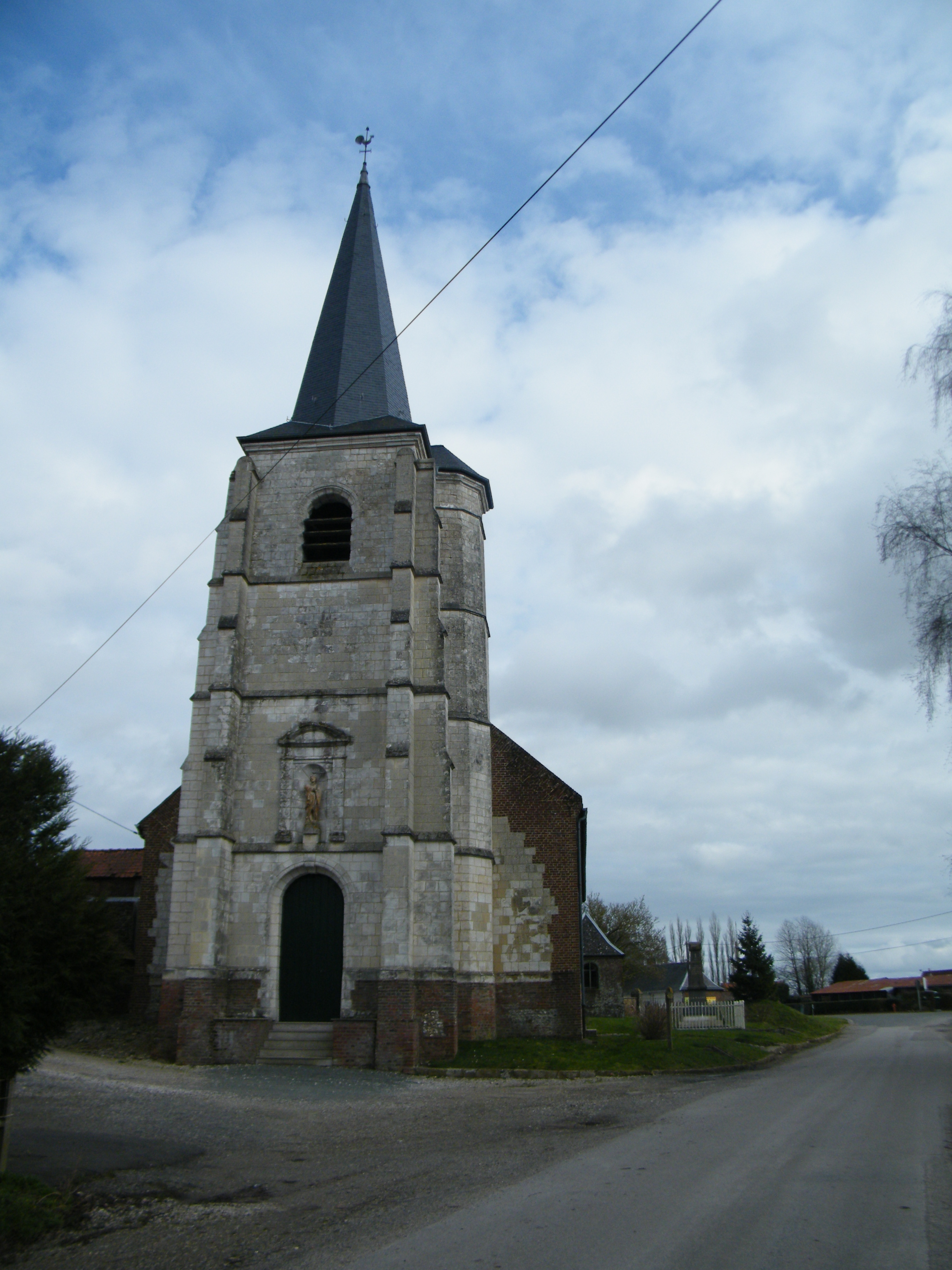 Église Saint-Jean-Baptiste d'Hiermont (Somme), France.